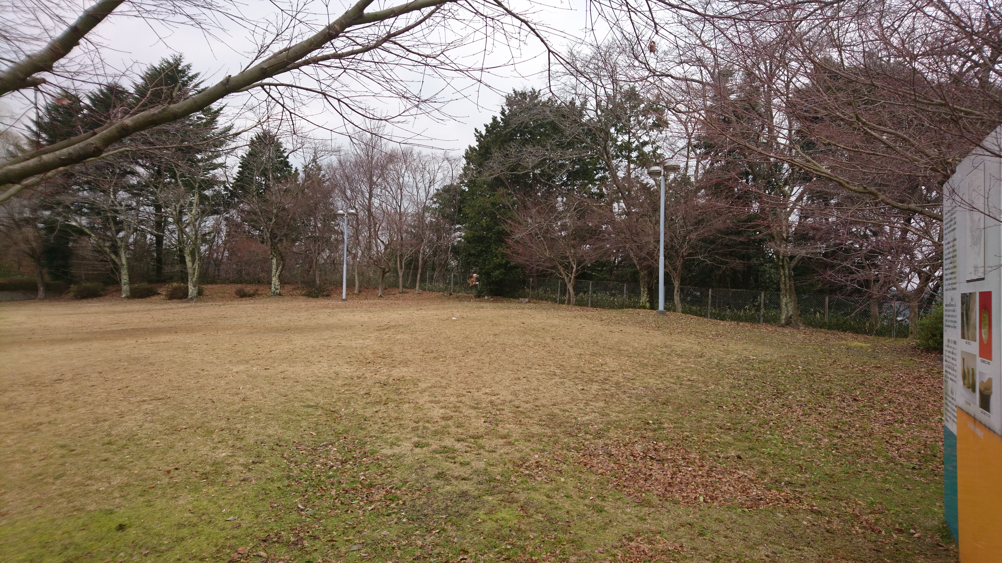 扇谷遺跡の丘陵